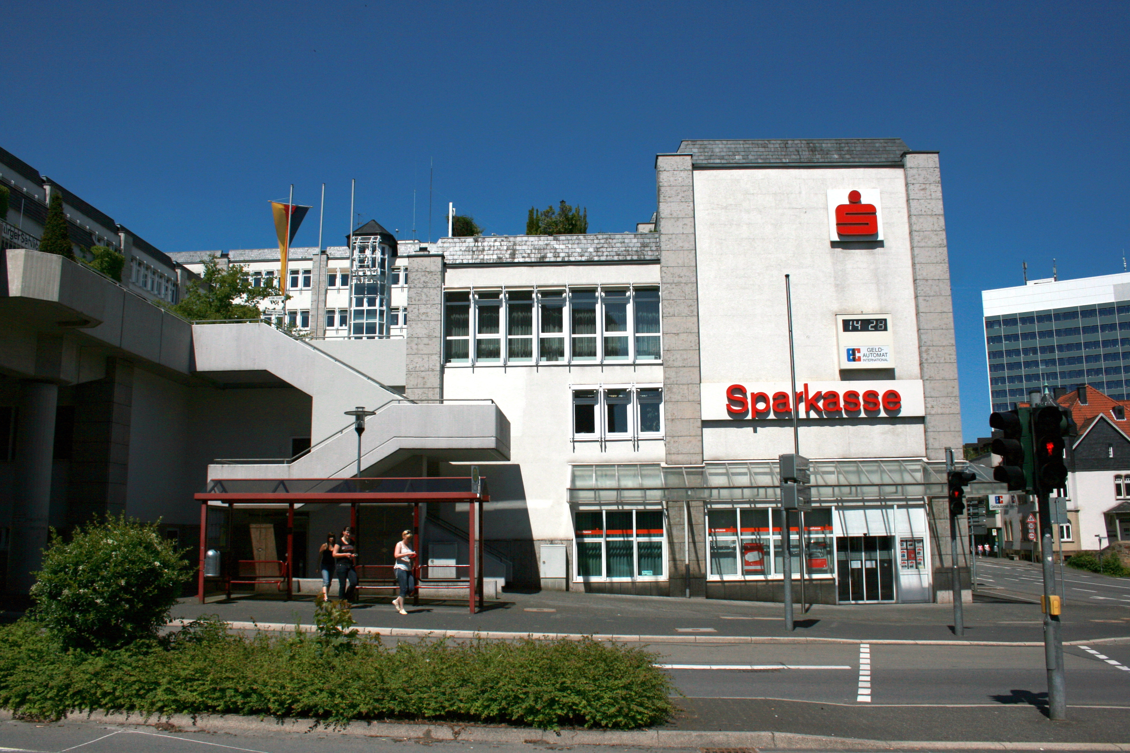 La-Roche-sur-Yon-Straße in Gummersbach